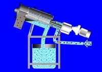 Flüssigkeitssiebmaschine der AZO GmbH + Co. KG